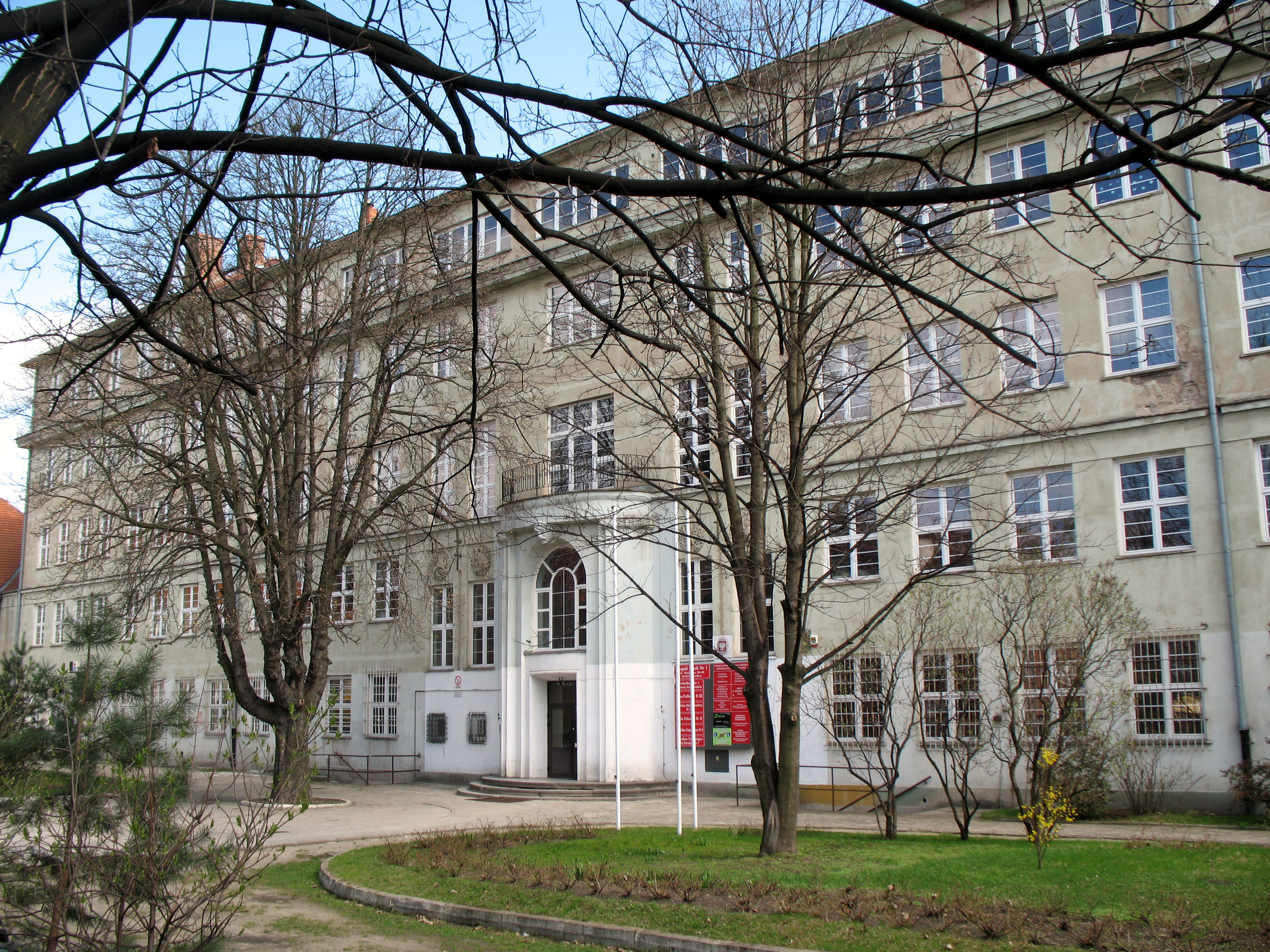 Wrocław, Zespół Szkół nr 1 (Liceum Profilowane nr XII; Zasadnicza Szkoła Zawodowa nr 10; Technikum nr 1; Technikum Uzupełniające nr 6; Technikum Uzupełniające dla Dorosłych nr 7; Szkoła Policealna nr 16; Szkoła Policealna dla Dorosłych nr 16), ul. Słubicka 29-33